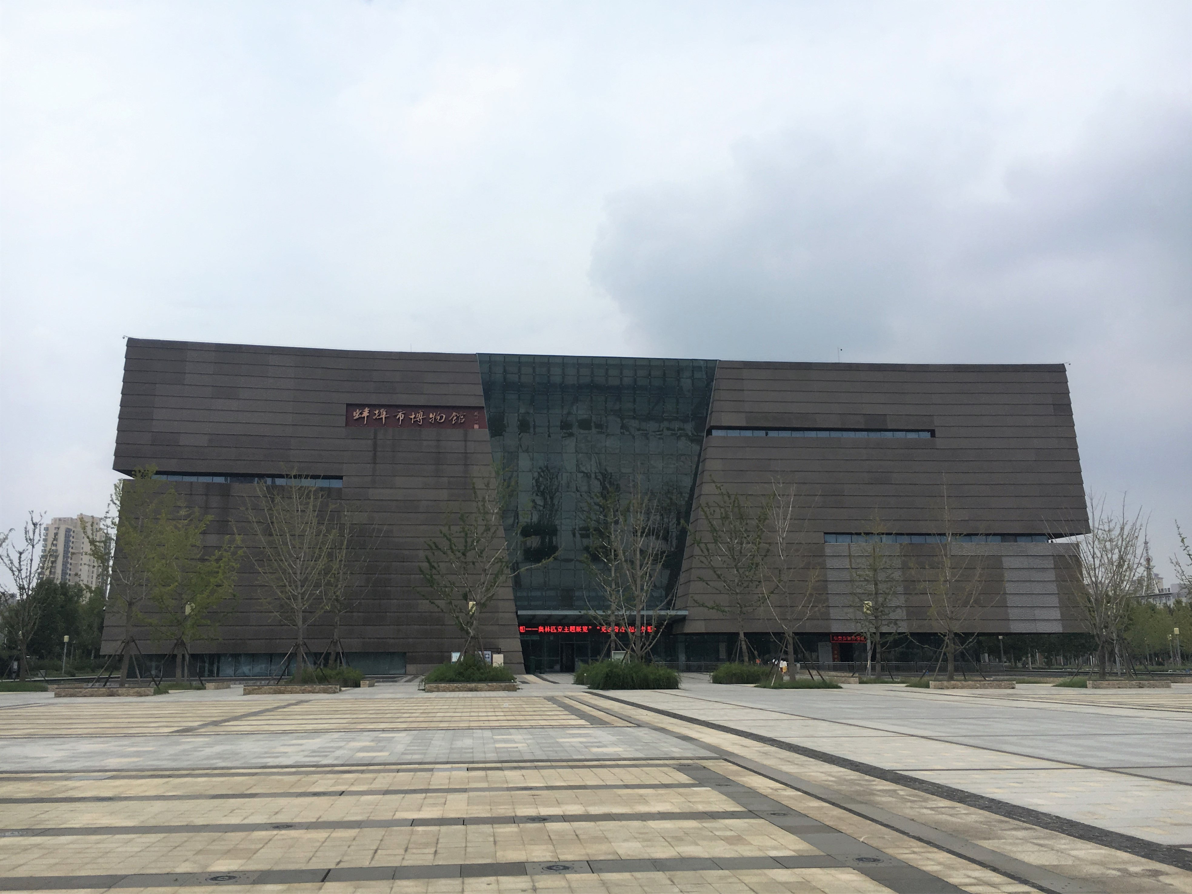 中文（中国大陆）: 蚌埠市博物馆（东门出入口角度）